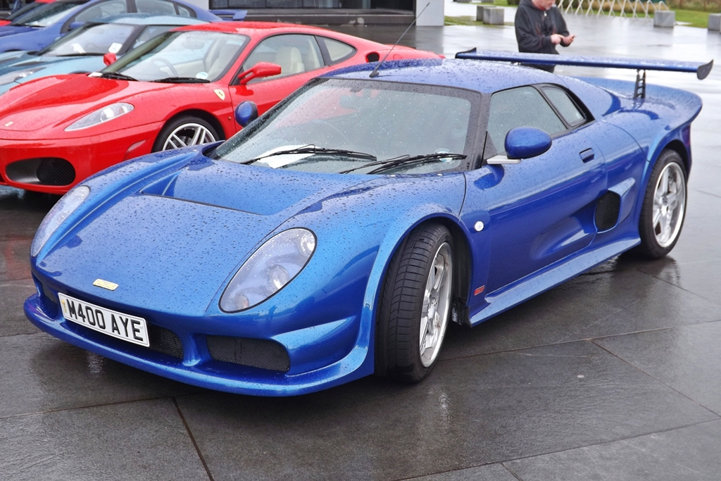 Noble